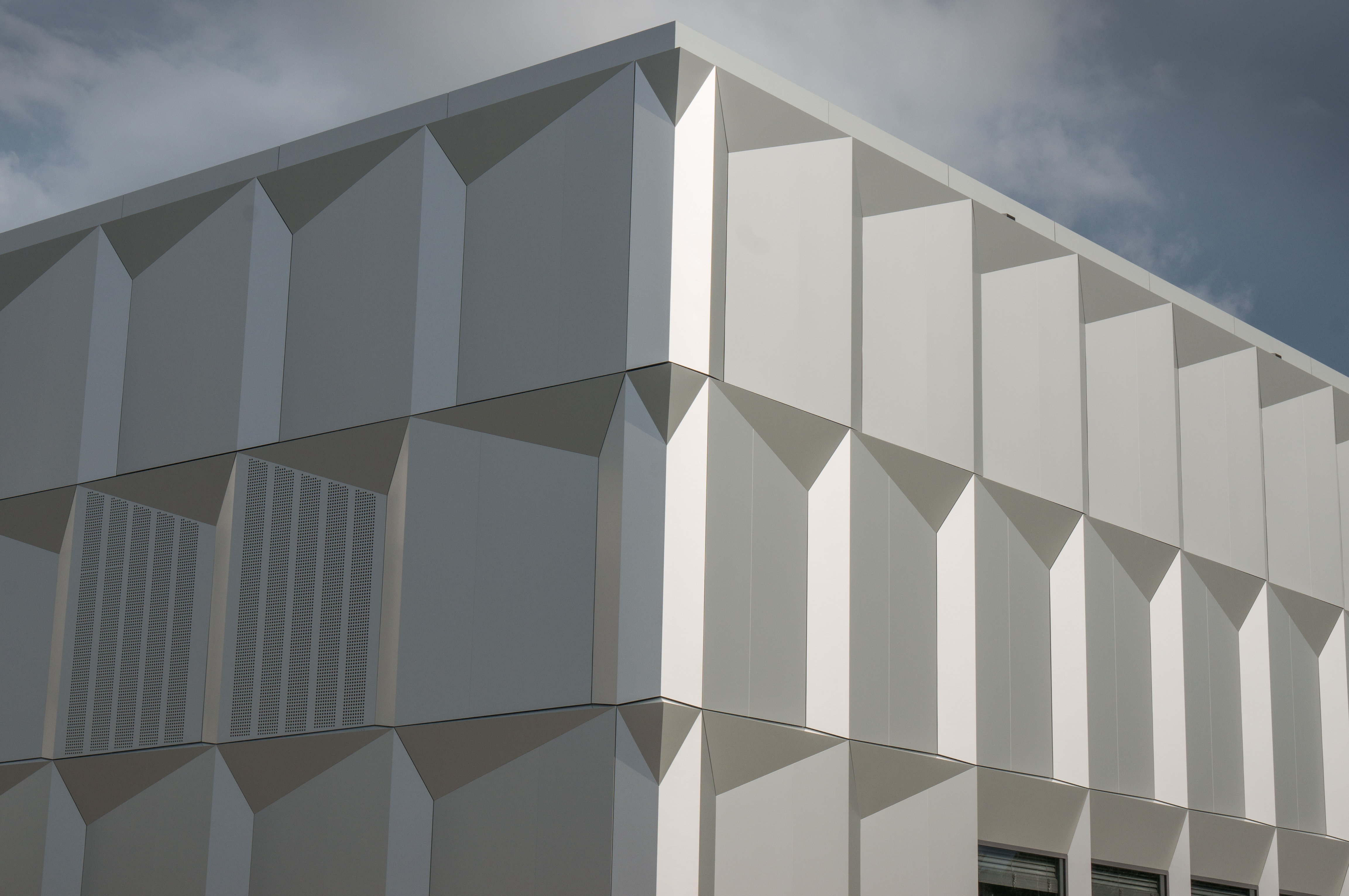 Die Fassade aus Aluminium kommt in diversen Lichtverhältnissen besonders bei den Turnhallen des Bildungszentrums Uster besonders zur Geltung